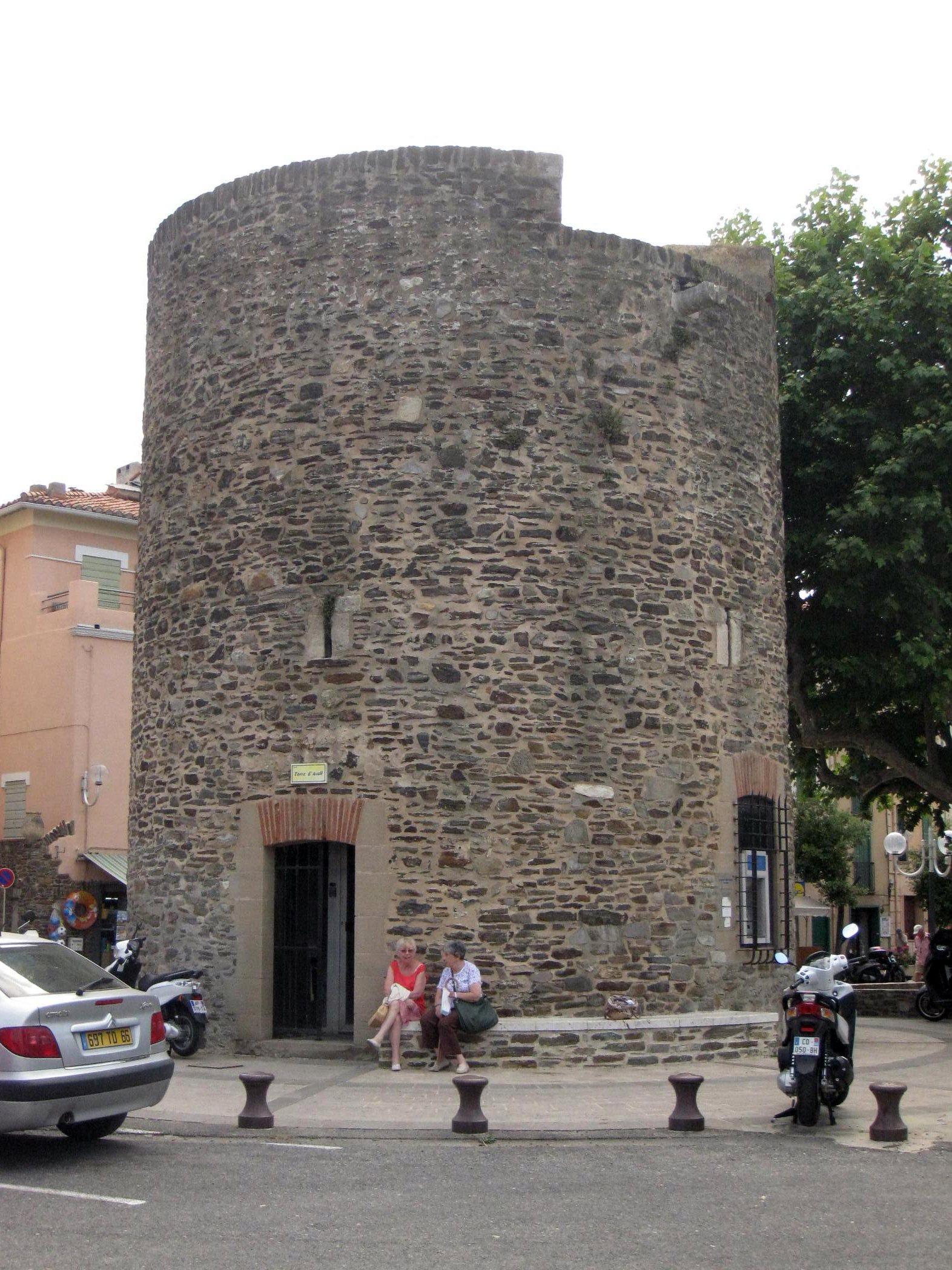 Fortificació de l'Artilleria i muralles (Cotlliure)